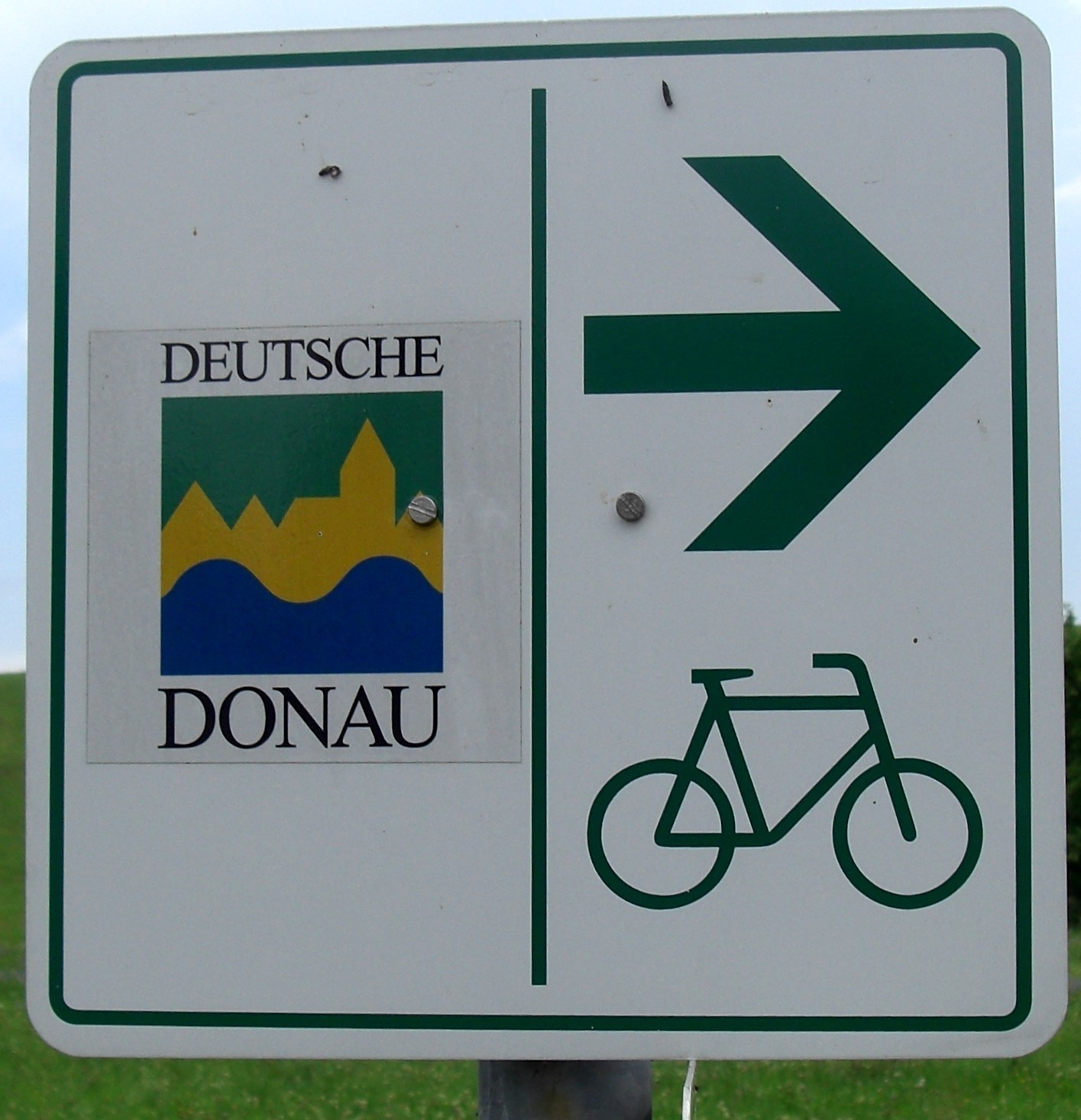 Hinweisschild des Radeweges an der Deutschen-Donau